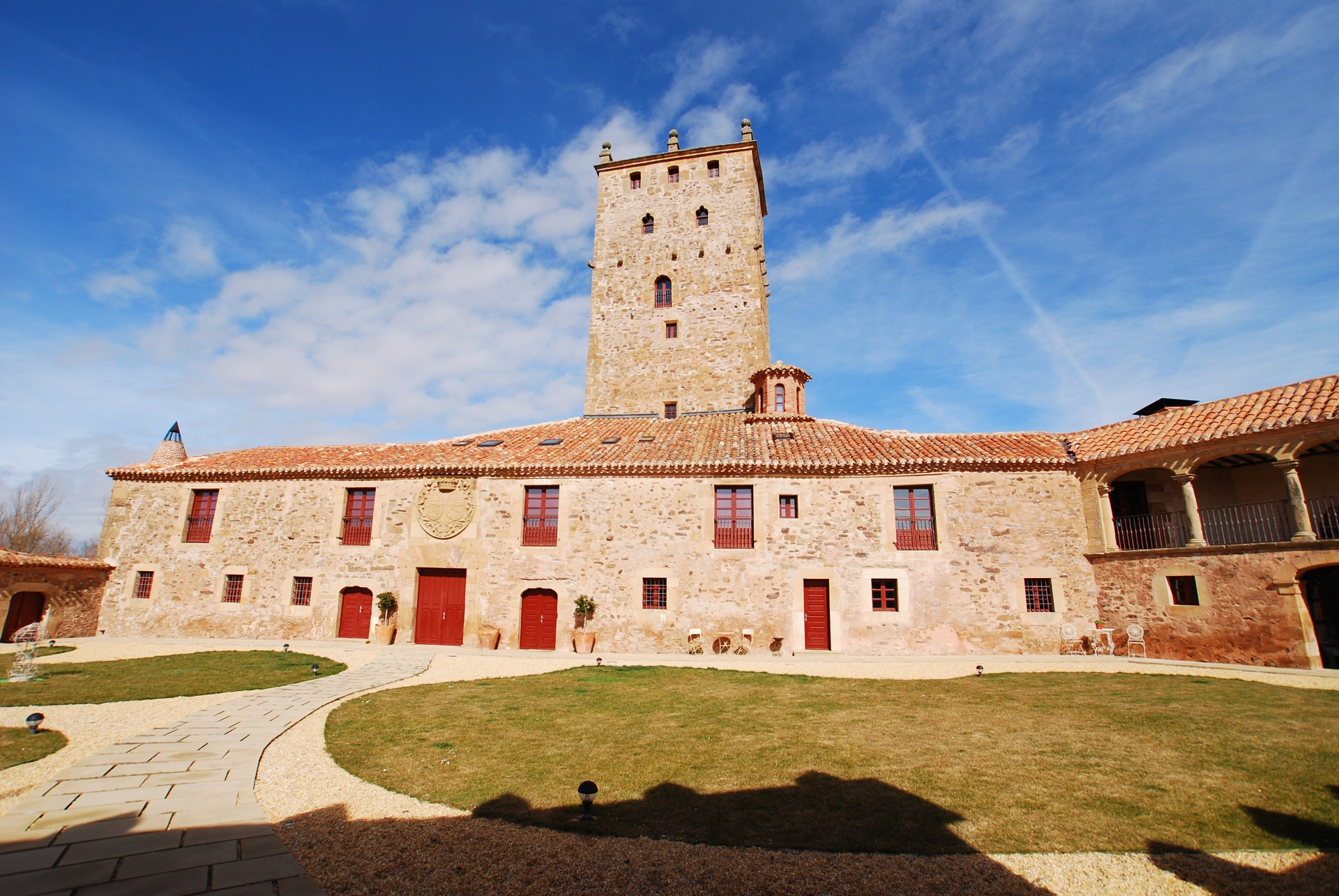 Torre y Palacio Medieval